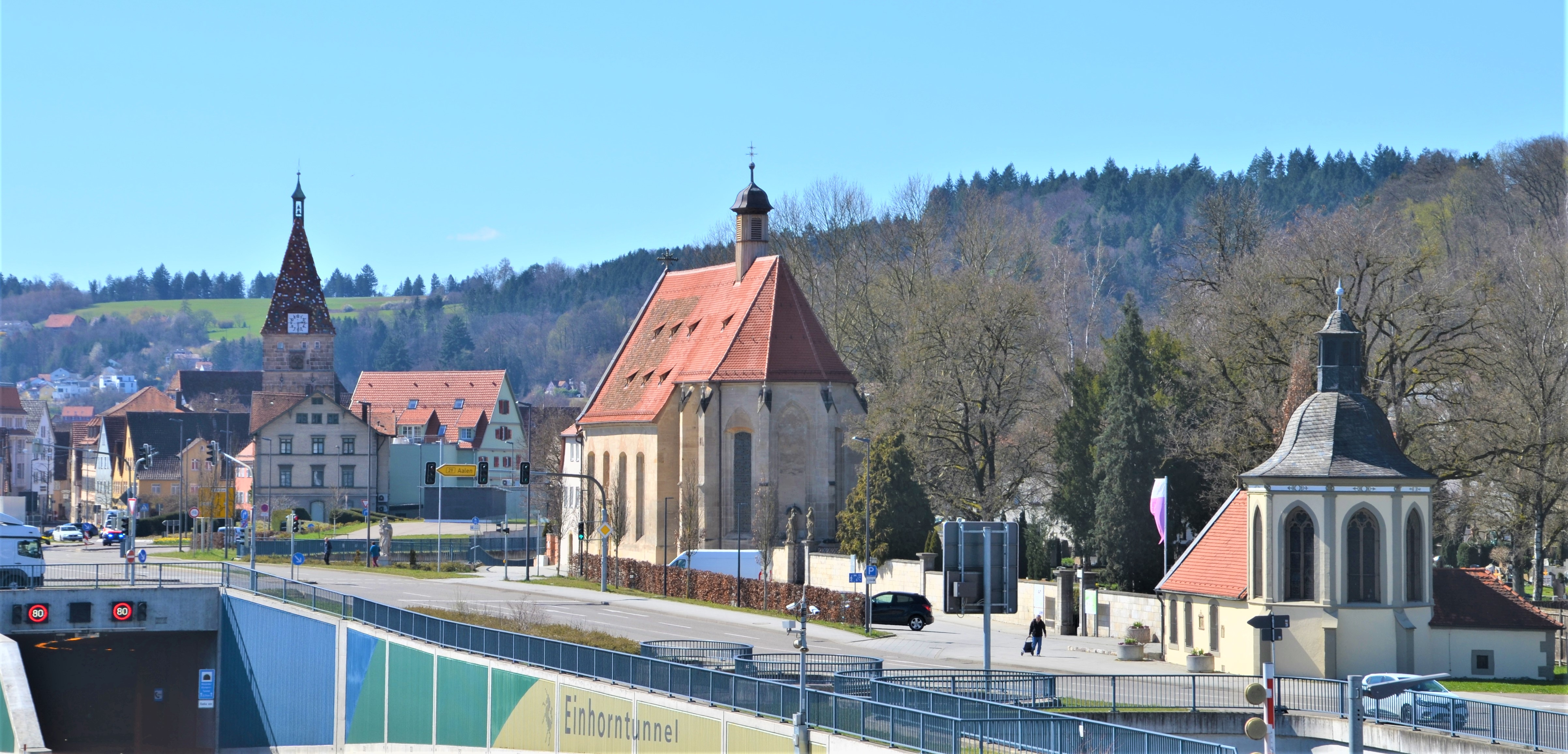 St. Leonhard, Herrgottsruhkapelle und Schmiedtorturm